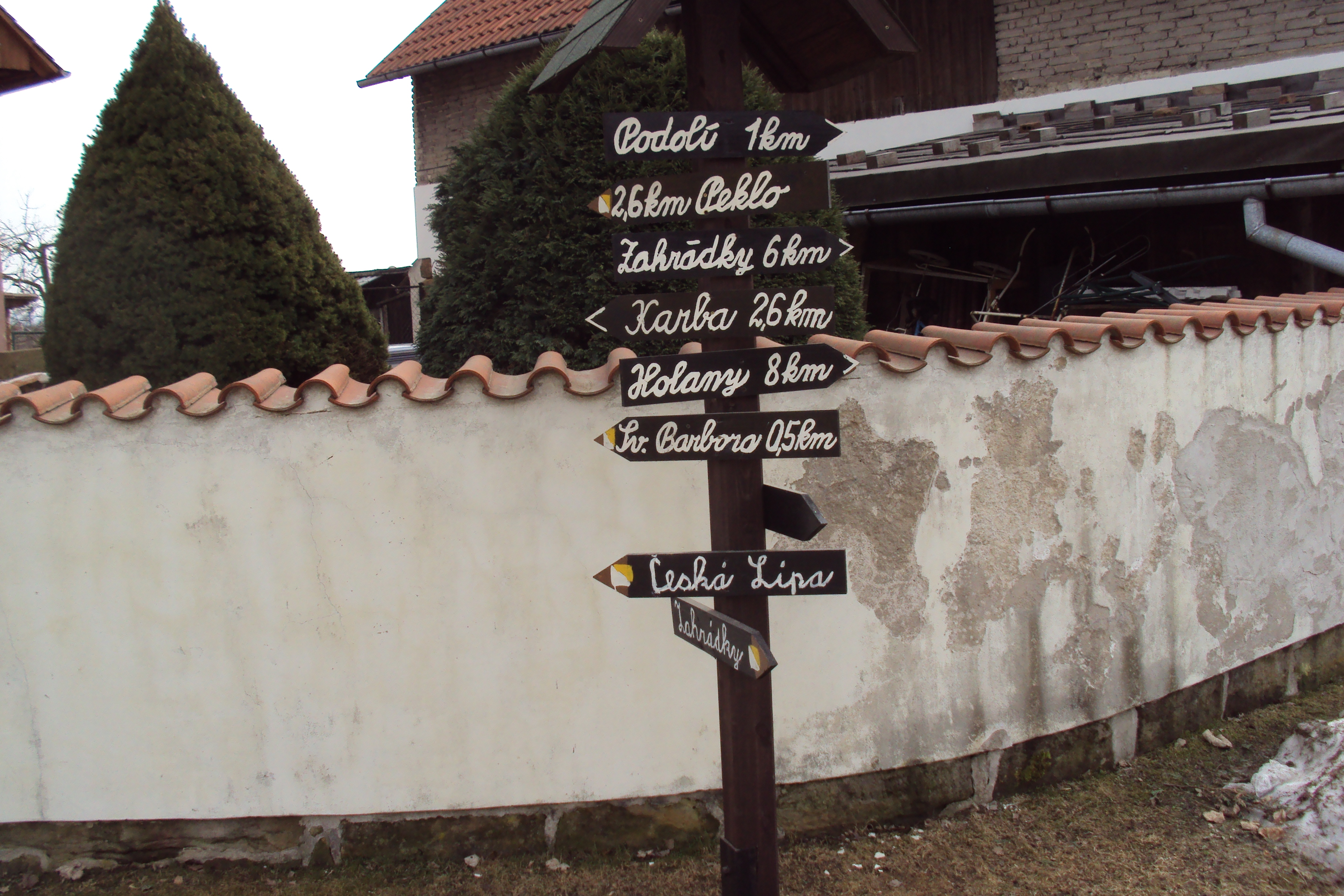 Turistický rozcestník v obci Kvítkov na Českolipsku